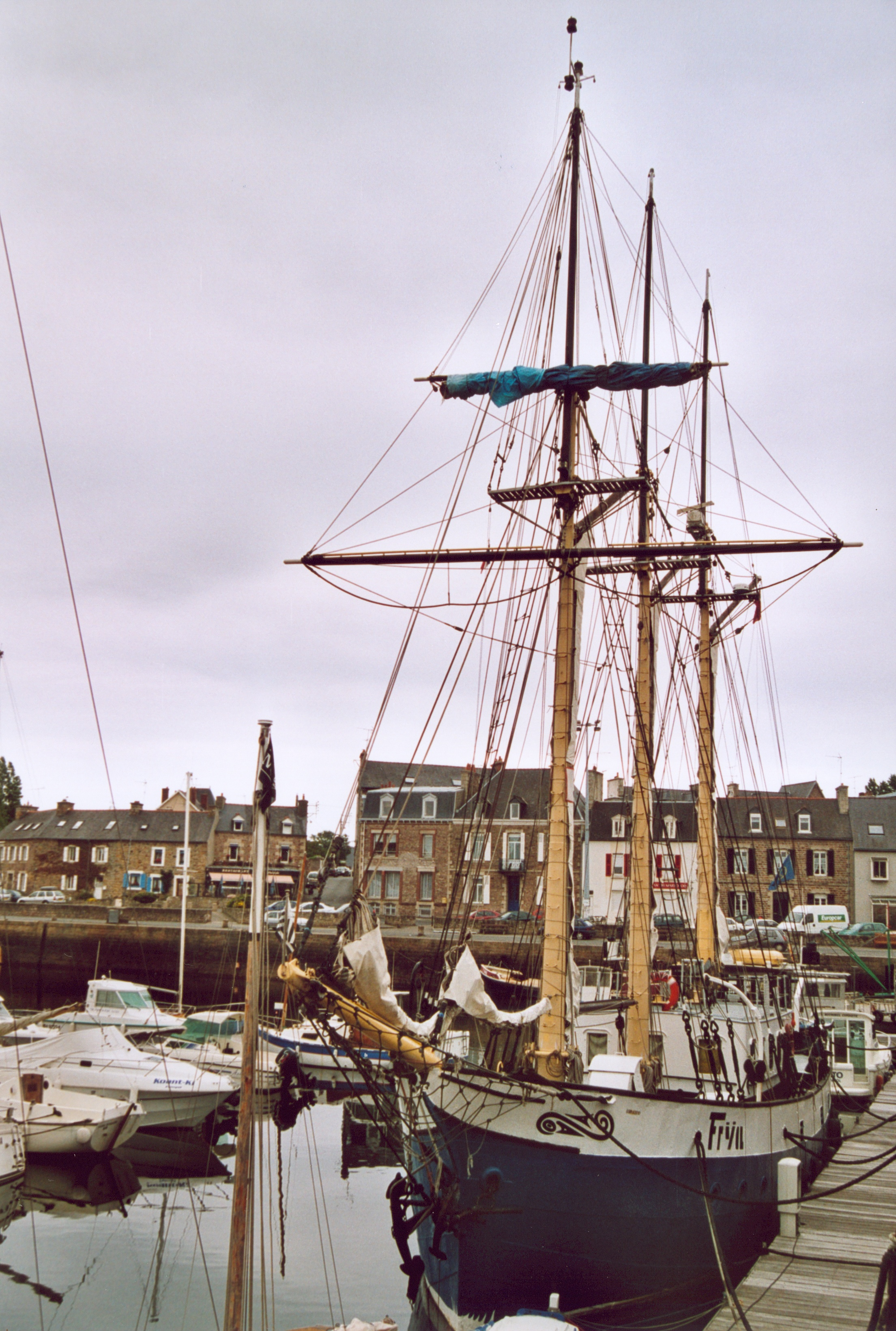 France Bretagne Côtes d'Armor Paimpol Le port Photographie prise par GIRAUD Patrick